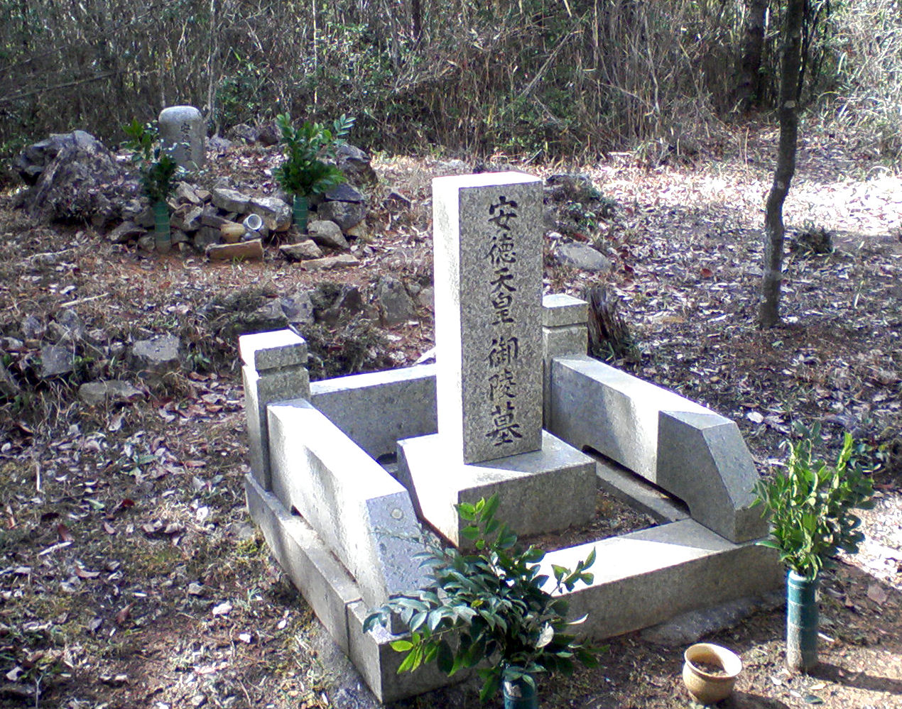 大阪能勢の来見山頂にある安徳天皇陵墓と伝えられる墳墓の写真